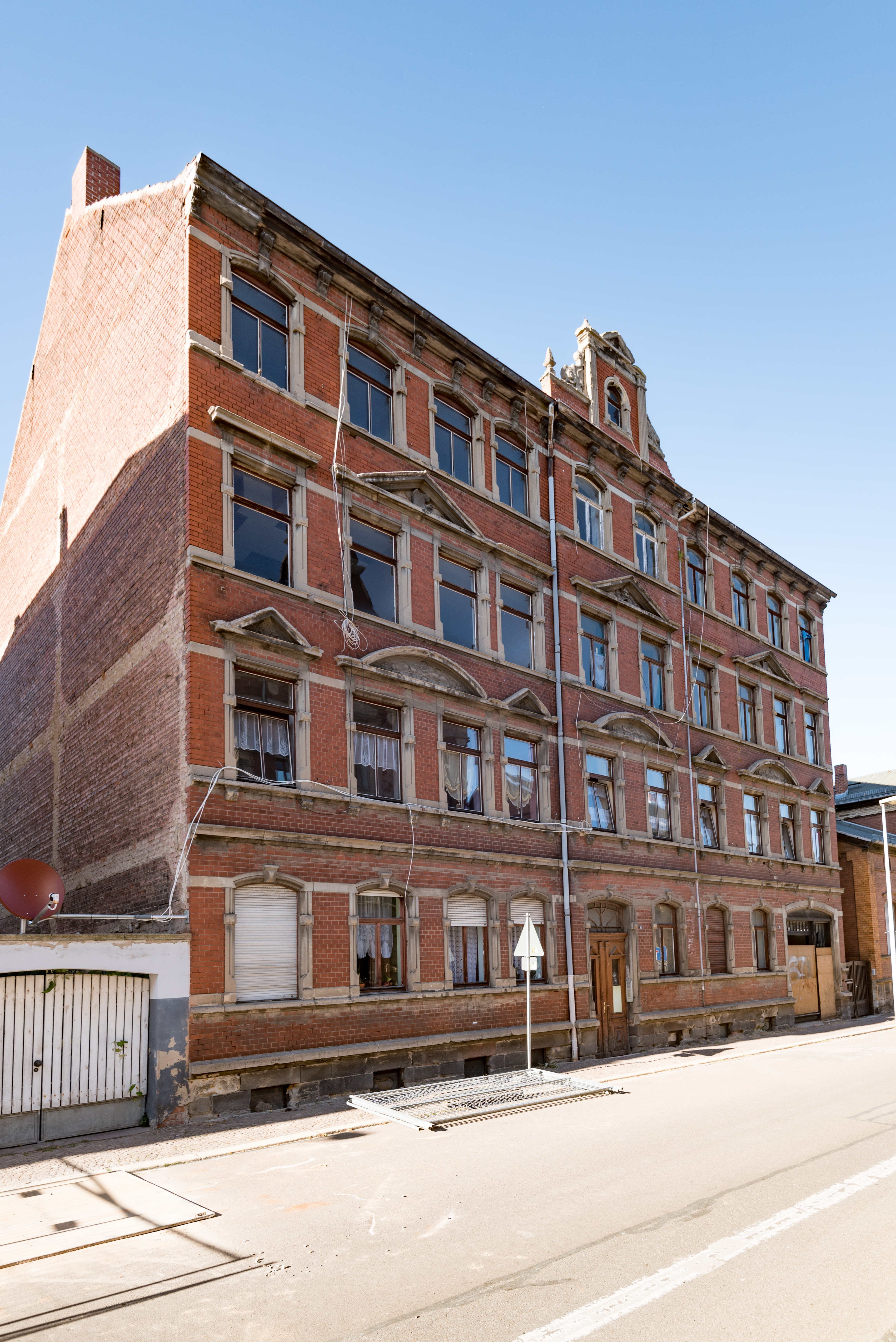 Weißenfels, Beuditzstraße 35